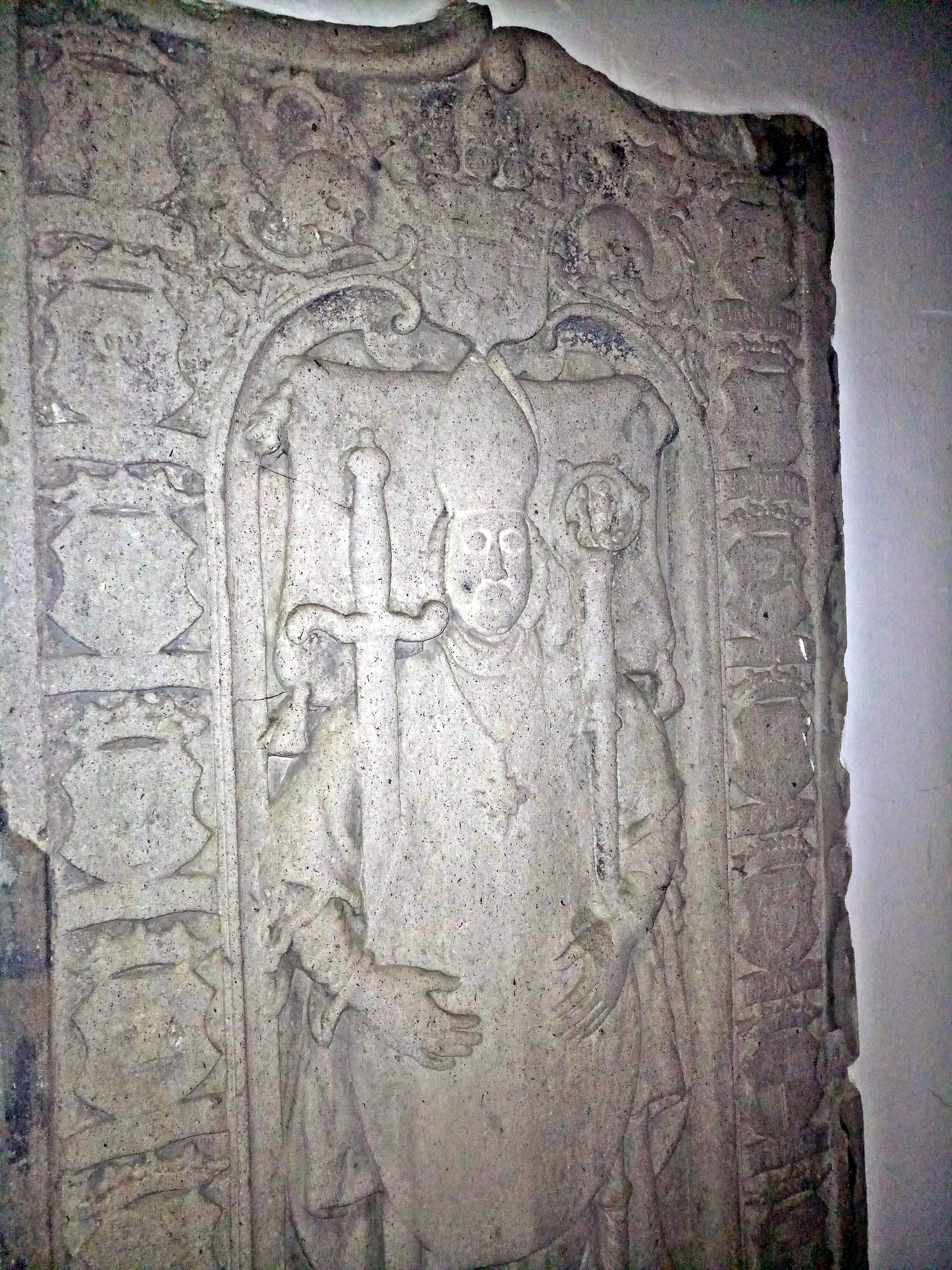 Abtei Michaelsberg, Siegburg, Krypta, Grabplatte von Abt Georg Christoph von Hagen (+ 1762)